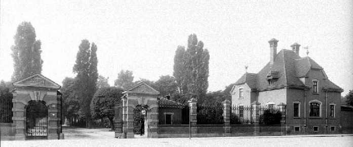 Der Eingang des Neuen Johannisfriedhofs in Leipzig (um 1900)